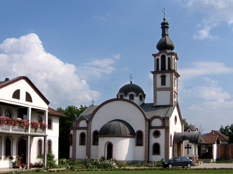 Hram Ognjene Marije u Čelopeku